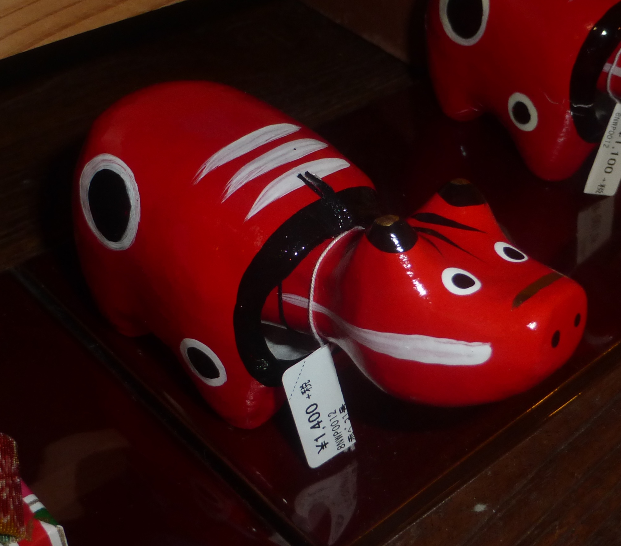 Akabeko (赤べこ)